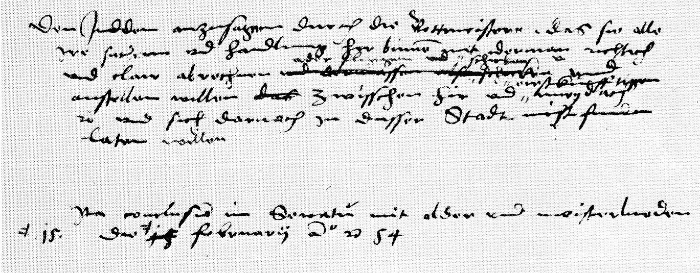 Ratsbeschluss über die Ausweisung der Juden aus Münster. Text: Der Stadtsekretär Franz von Werne erhält den Auftrag „den Juden durch die Botenmeister anzusagen, dass sie alle ihre Sachen und Handlungen in der Stadt mit jedermann richtig und klar abrechnen oder Abgaben schicken und ausstellen bis zum nächsten Montag (19.2.1554) und sich danach in dieser Stadt nicht mehr finden lassen wollen.“